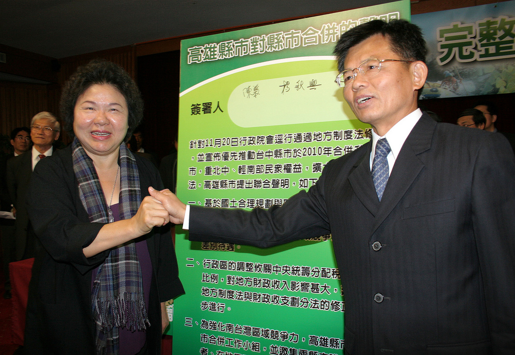 中文（台灣）: 高雄市市長陳菊與高雄縣縣長楊秋興簽署《高雄縣市對縣市合併的聲明》，堅持高雄縣市與台中縣市同步合併。